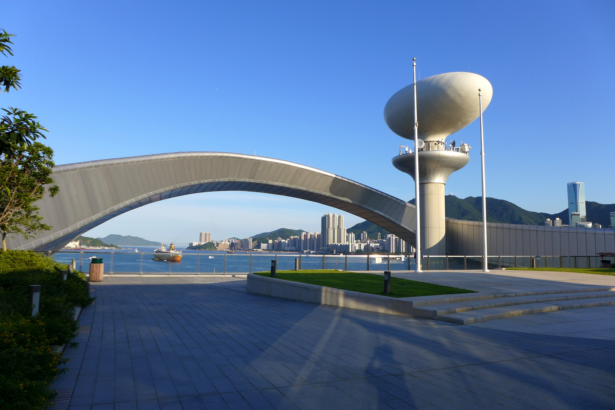 Kai Tak Cruise Terminal Park Flagpole Plaza